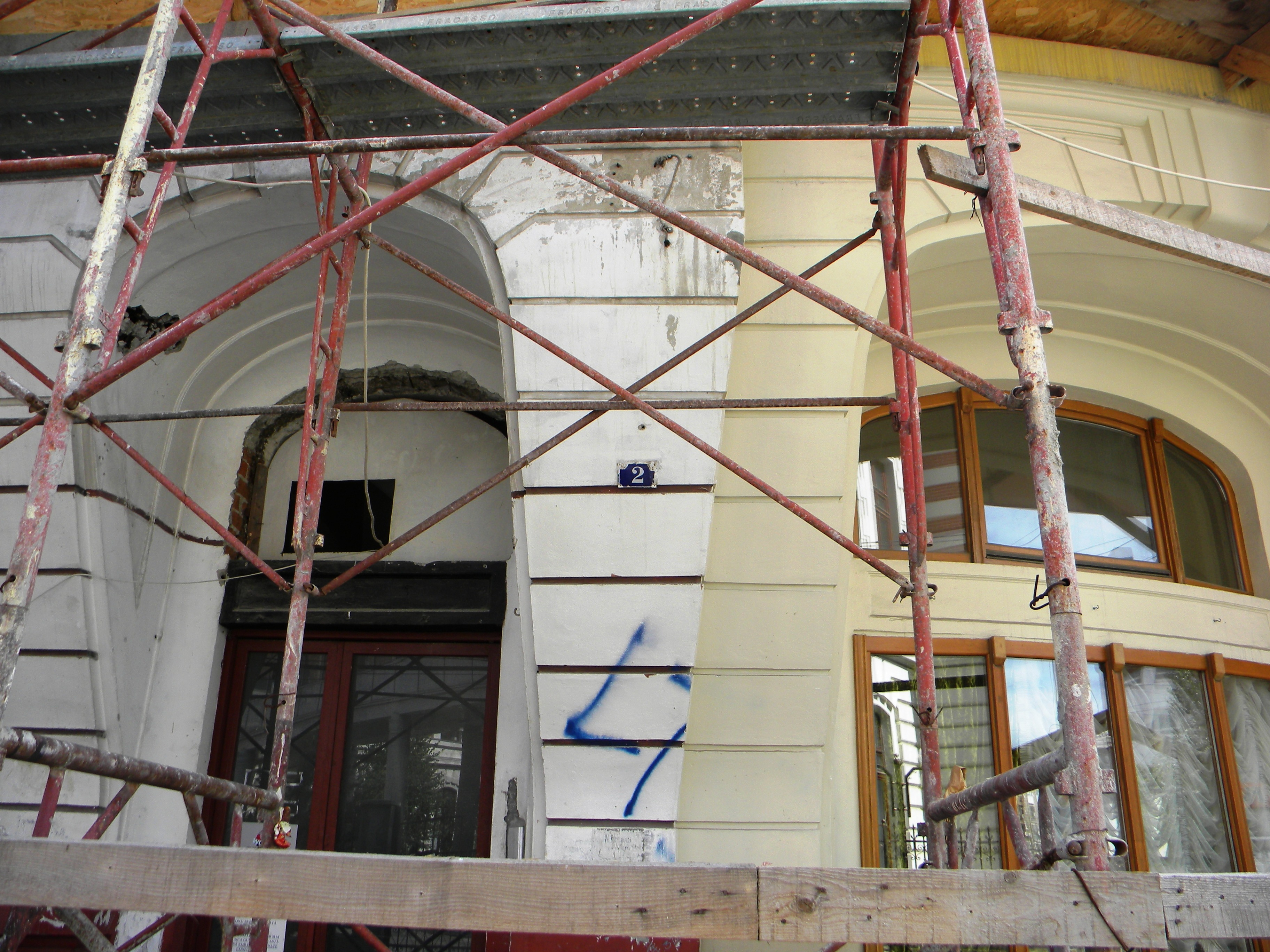 Bucuresti, Romania, Casa pe Str. Slanic nr. 2, sect. 3 (detaliu 1)